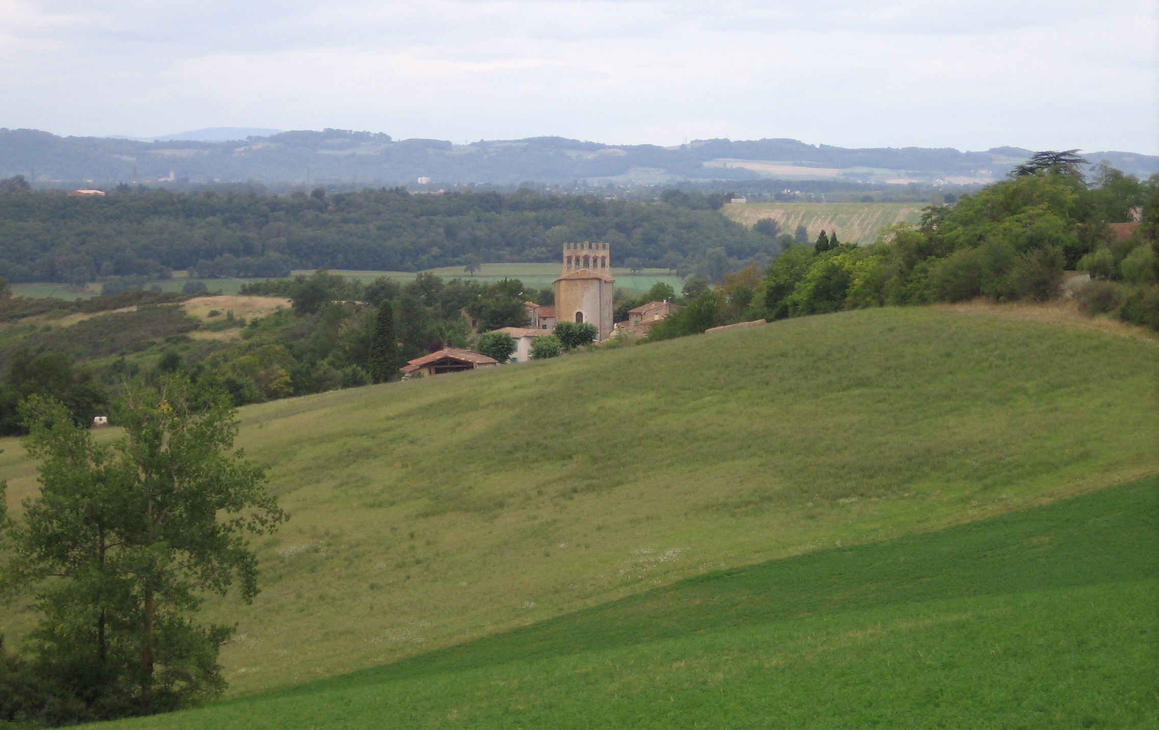 Le village de Saint-Félix-de-Tournegat dans le département de l'Ariège (France)